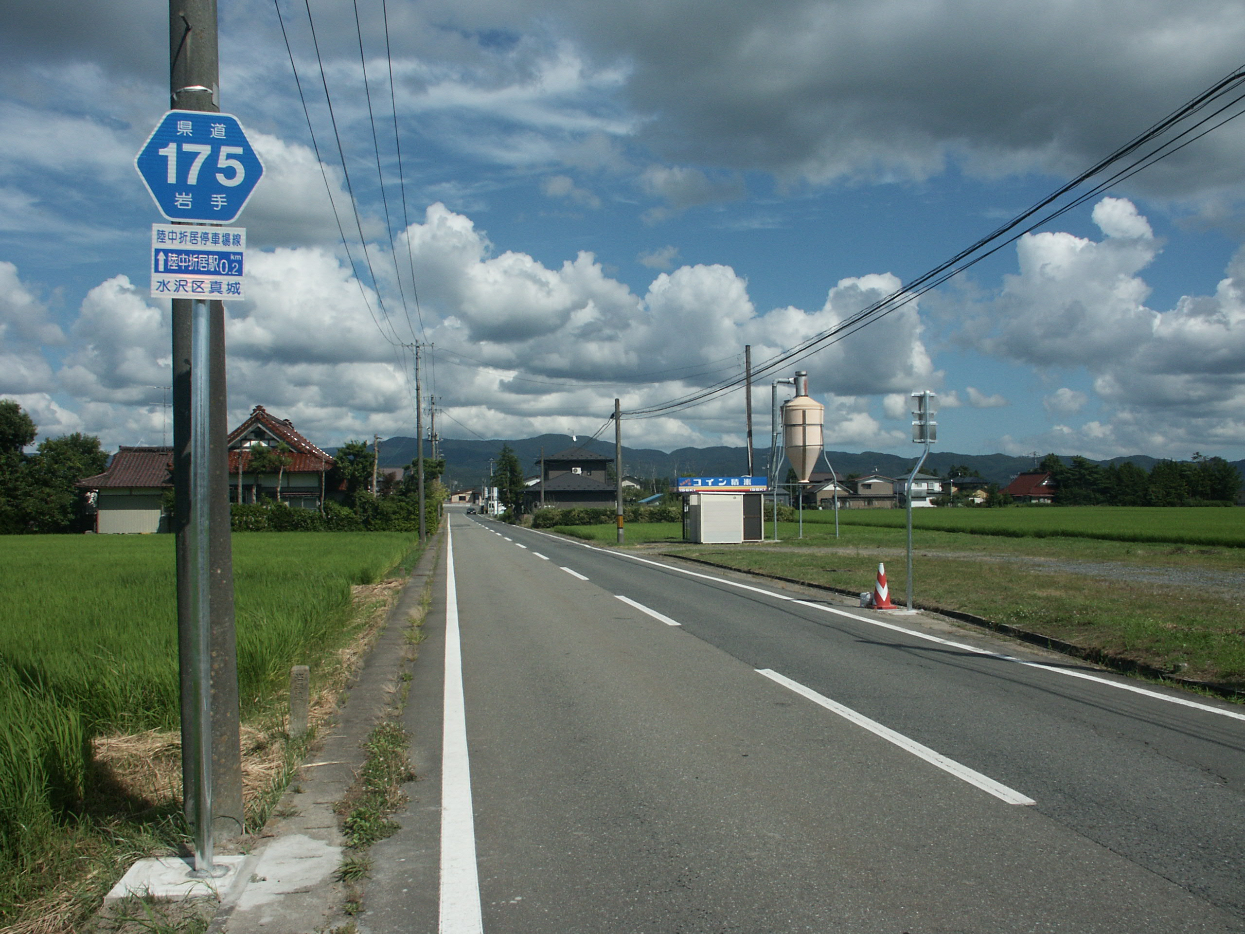 岩手県道175号線奥州市水沢区真城付近